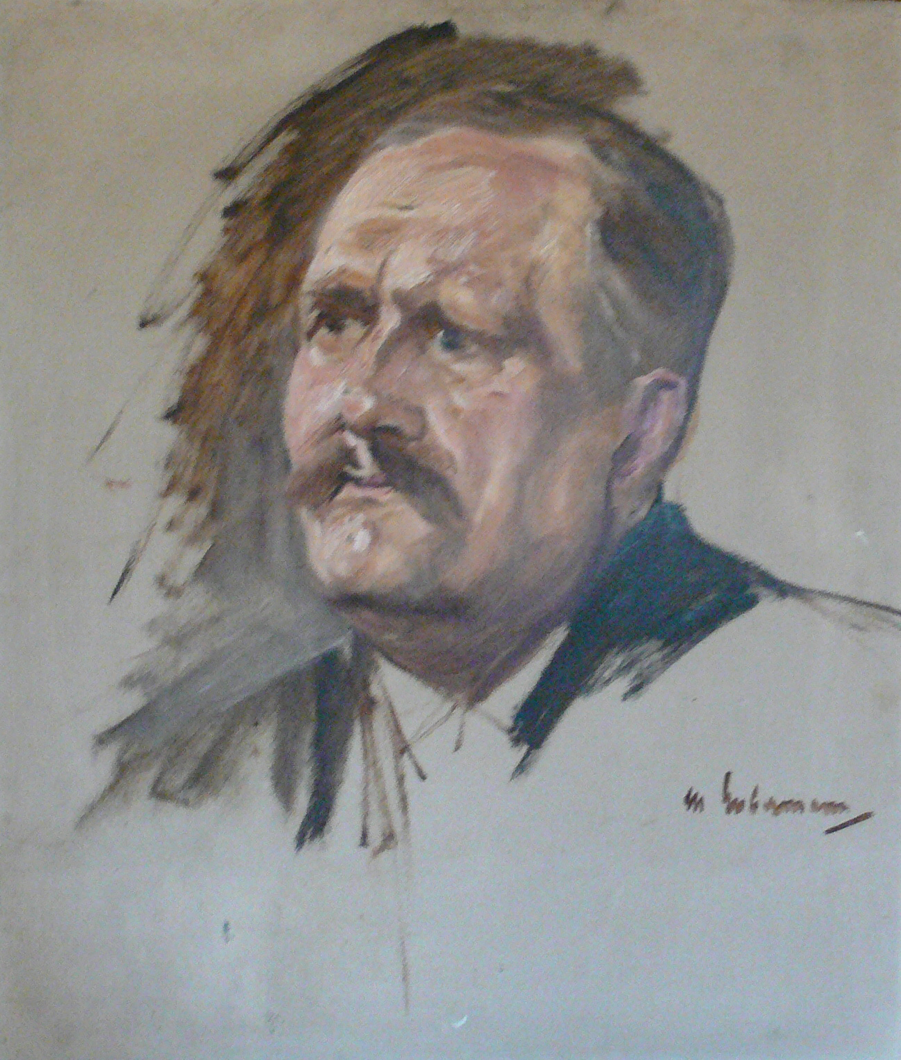 Max Liebermann: Skizze zum Porträt Friedrich Naumann; Theodor-Heuss-Haus, Stuttgart